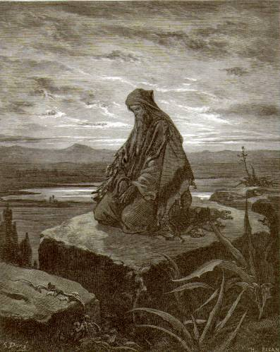 Gravure sur l'Ancien Testament